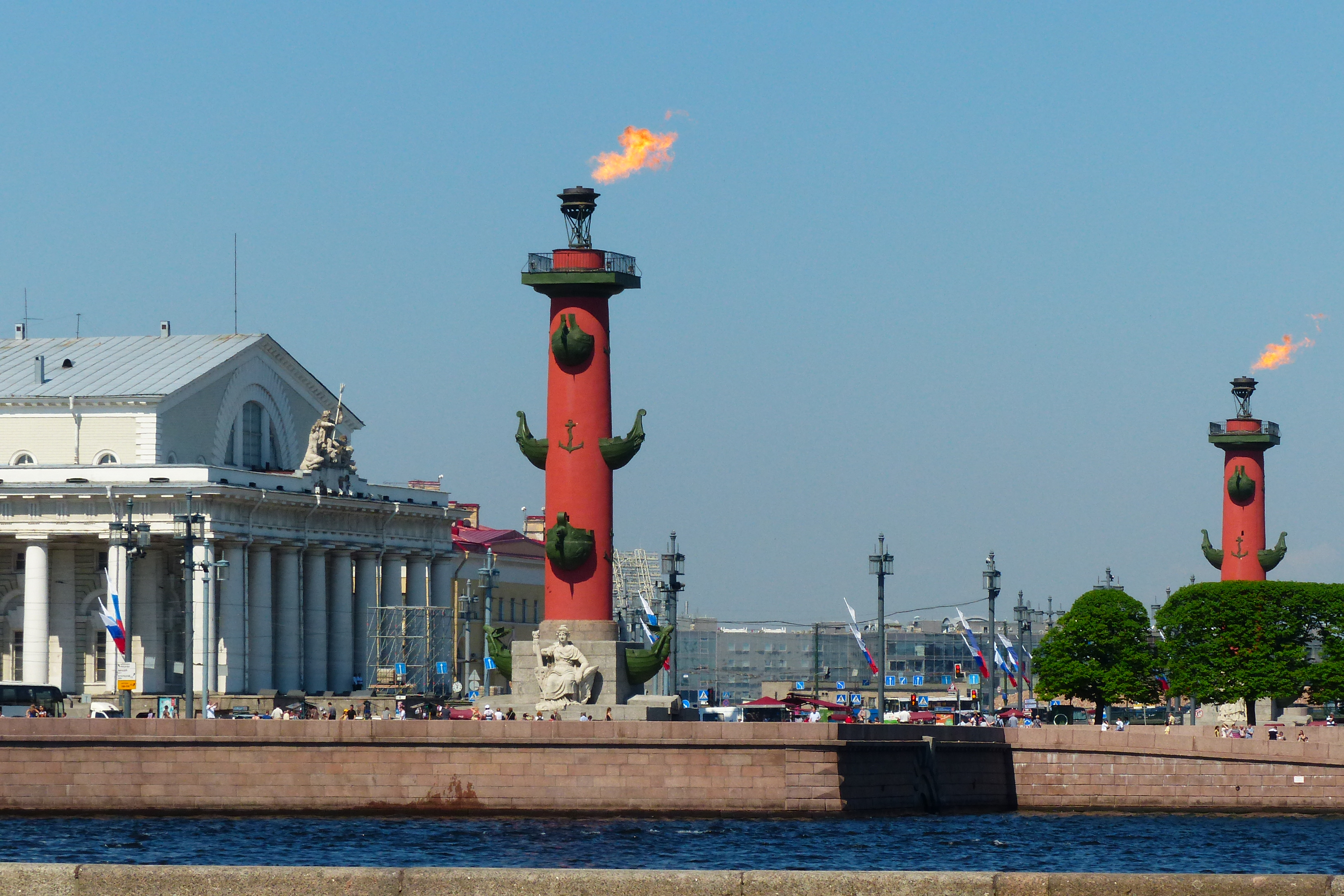 Die hier "befeuerten" - längst außer Dienst gestellten - Leuchttürme sicherten einst die Durchfahrt auf der Newa an einem Brückenengpass. Links die kassizistische Fassade der Alten Börse